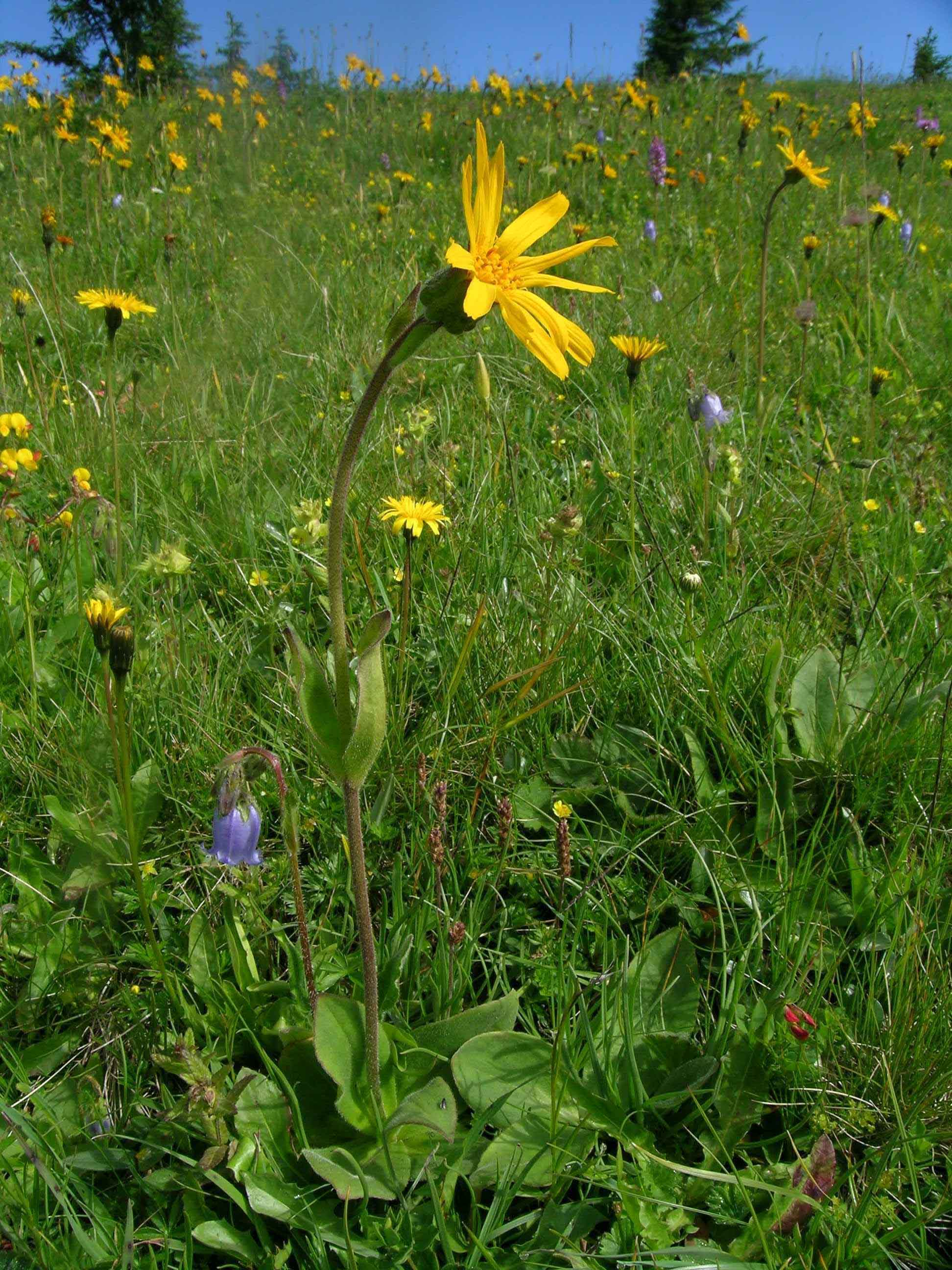 Arnica montana, Aspektfoto eines Nardion, Schynige Platte, Kt. Bern, CH